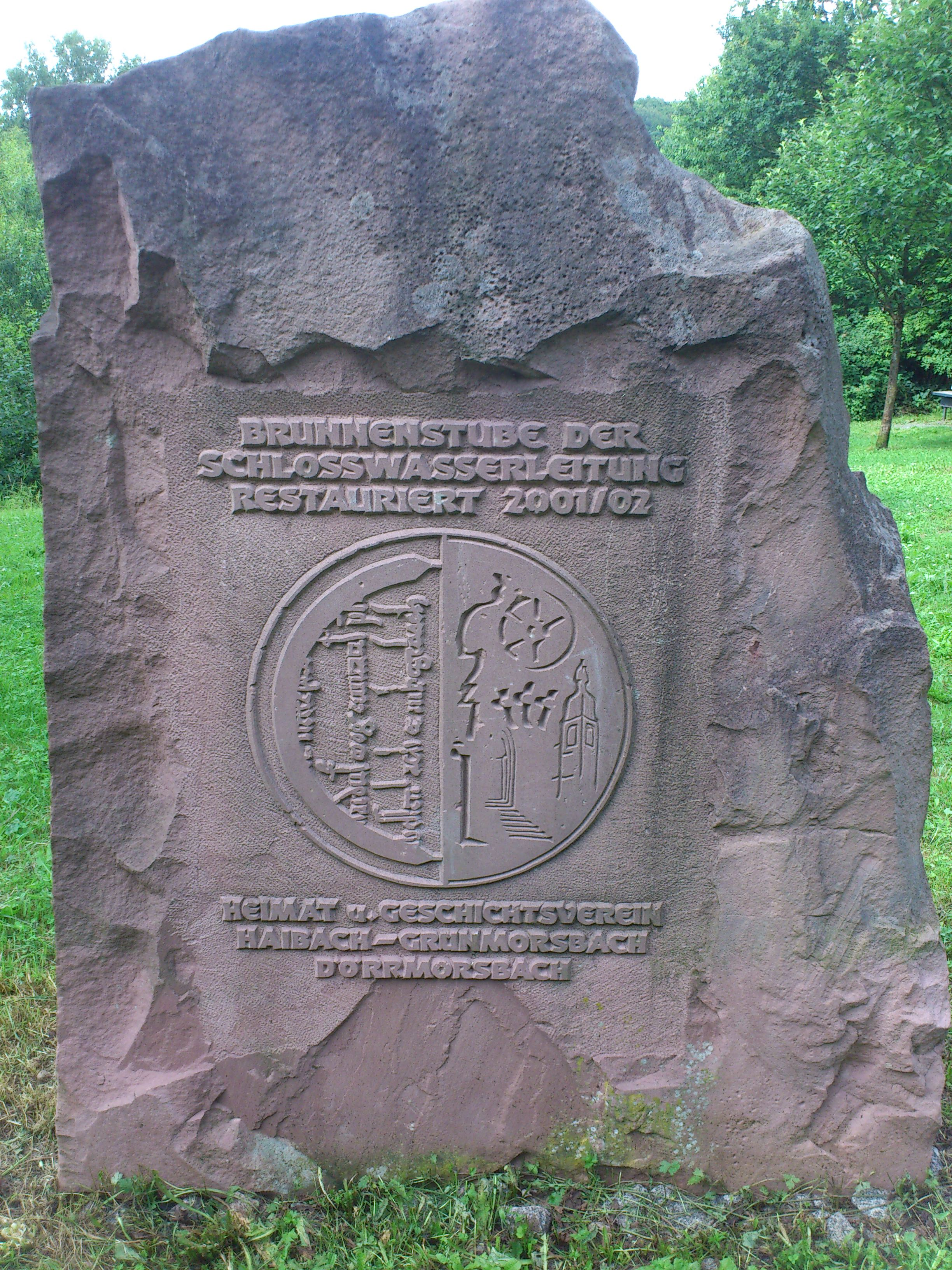 Steintafel an der Brunnenstube in Haibach